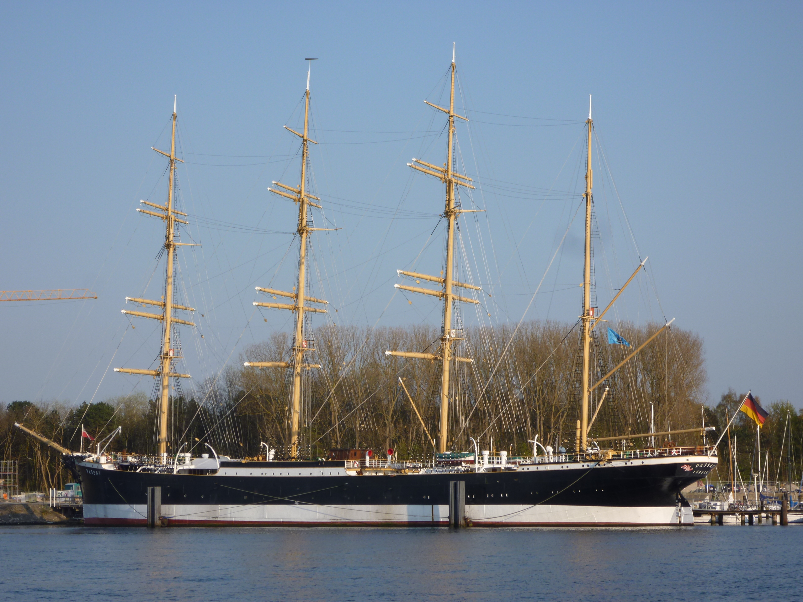 Das Museumsschiff "Passat" am Priwall in Travemünde.